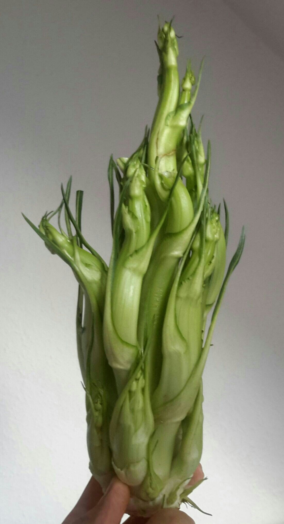 Der innere Teil nachdem die löwenzahnähnlichen Blätter entfernt sind